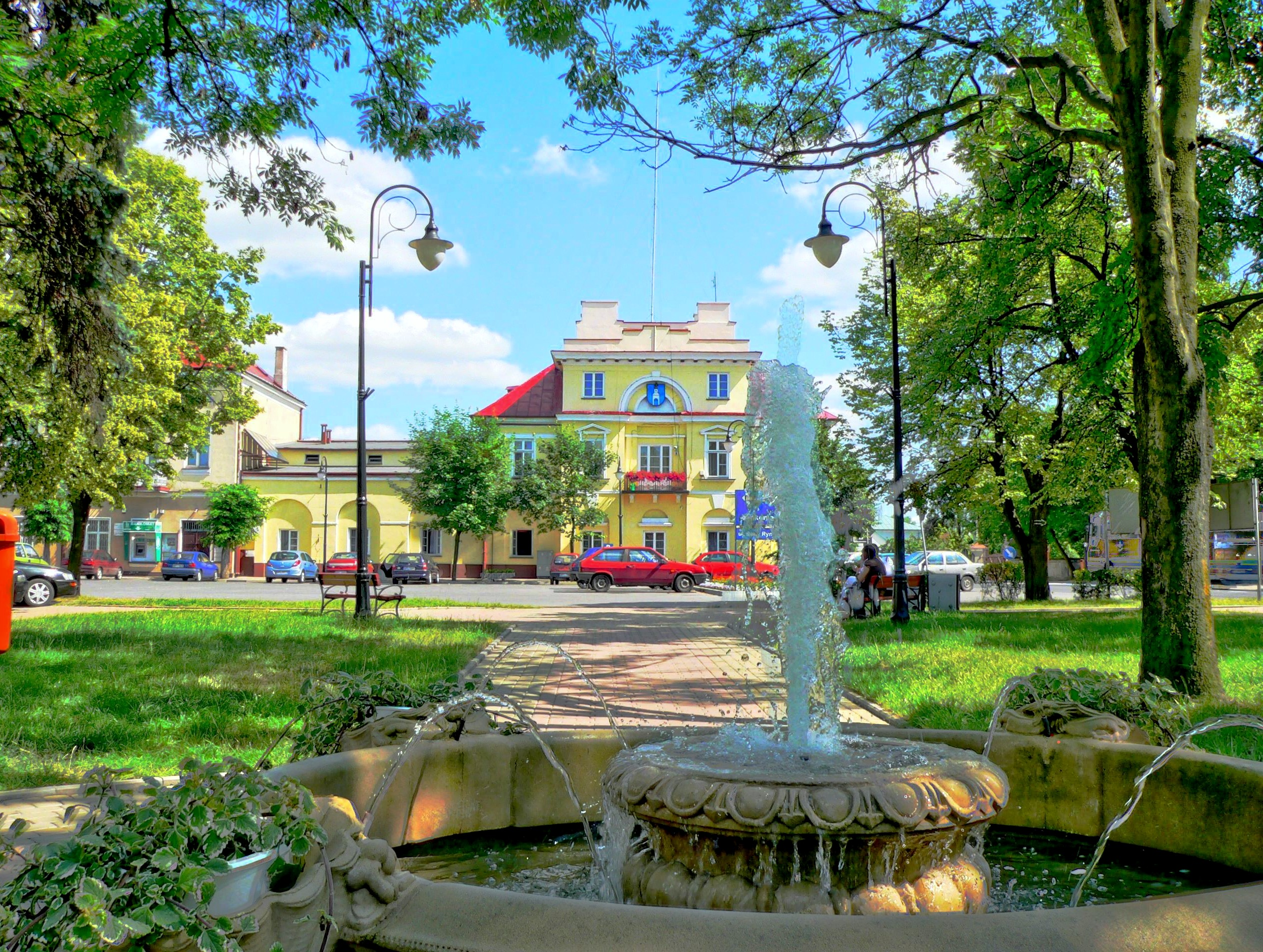 Park w Gąbinie w tle zabytkowy klasycystyczny ratusz z XIXw.